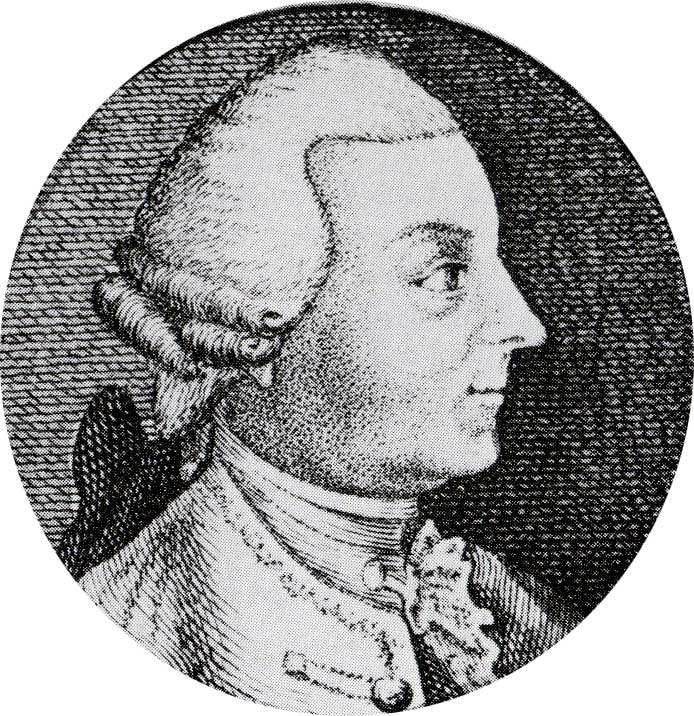 Johannes van Lier (1726-1799), gedeputeerde en ontvanger-generaal van Drenthe volgens Nieuwe Drentse Volksalmanak geschilderd door Wibrand Veltman (1744-1800)